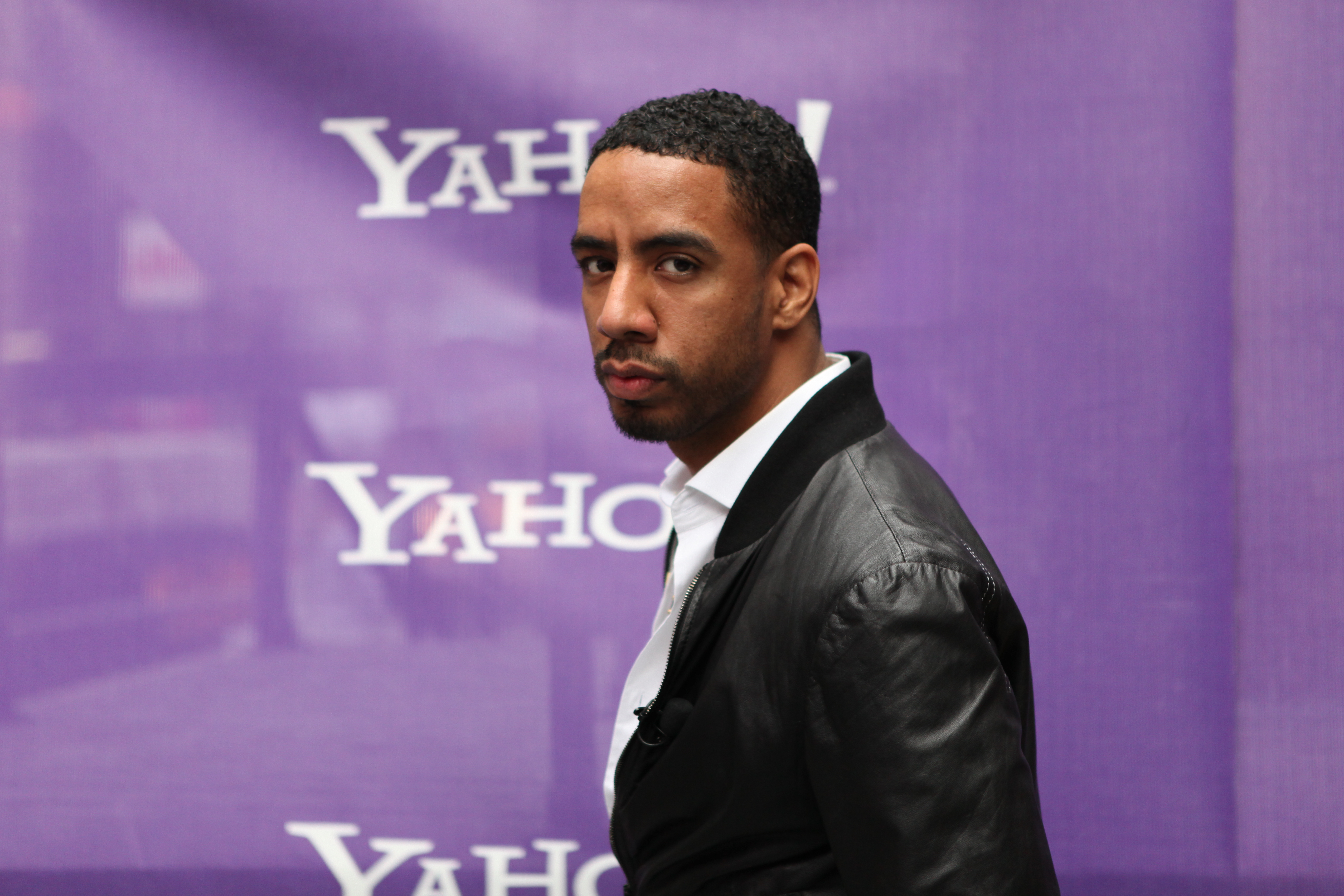 R&B sensation Ryan Leslie